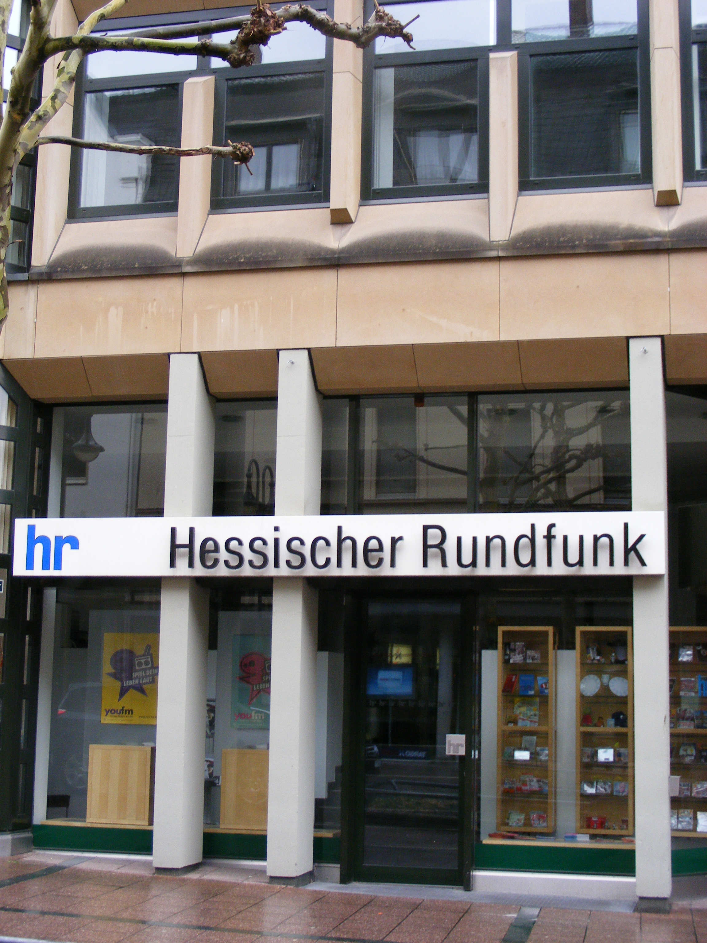 Studio Fulda des Hessischen Rundfunks (Bahnhofstraße 4 36037 Fulda).